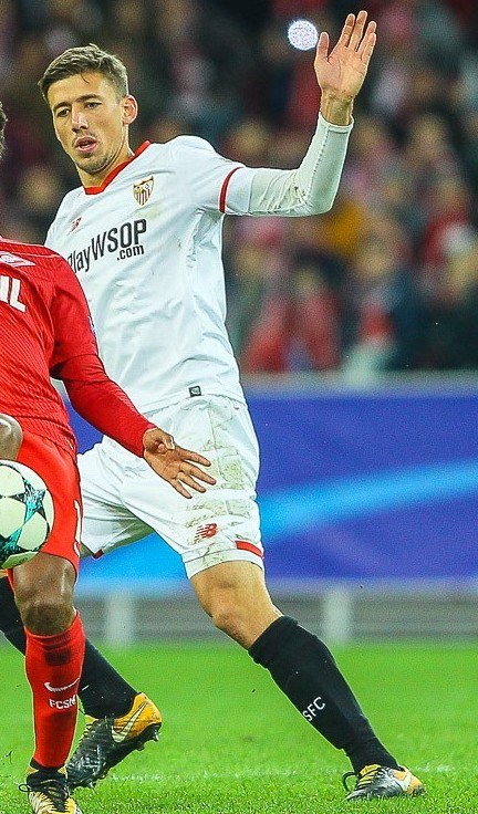 Luiz Adriano de Souza da Silva, Clément Lenglet